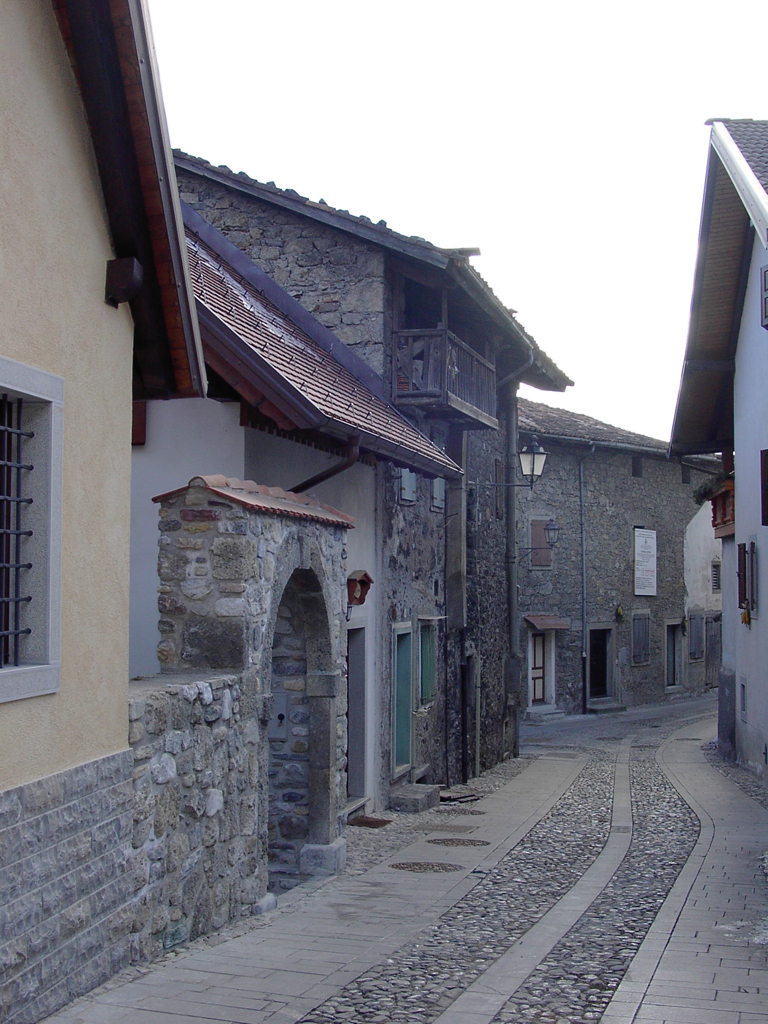 Sutrio